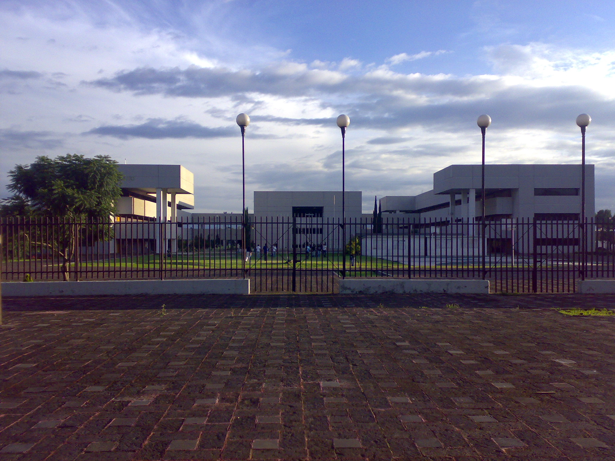 Vista de frente de la Escuela Superior de Cómputo del Instituto Politecnico Nacional, México.